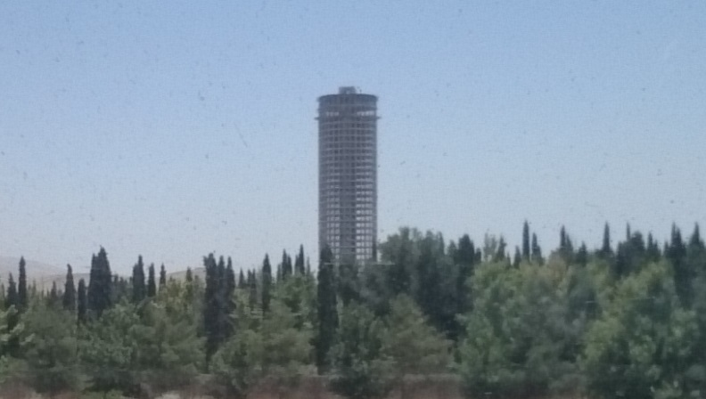 برج هتل فارس در شیراز